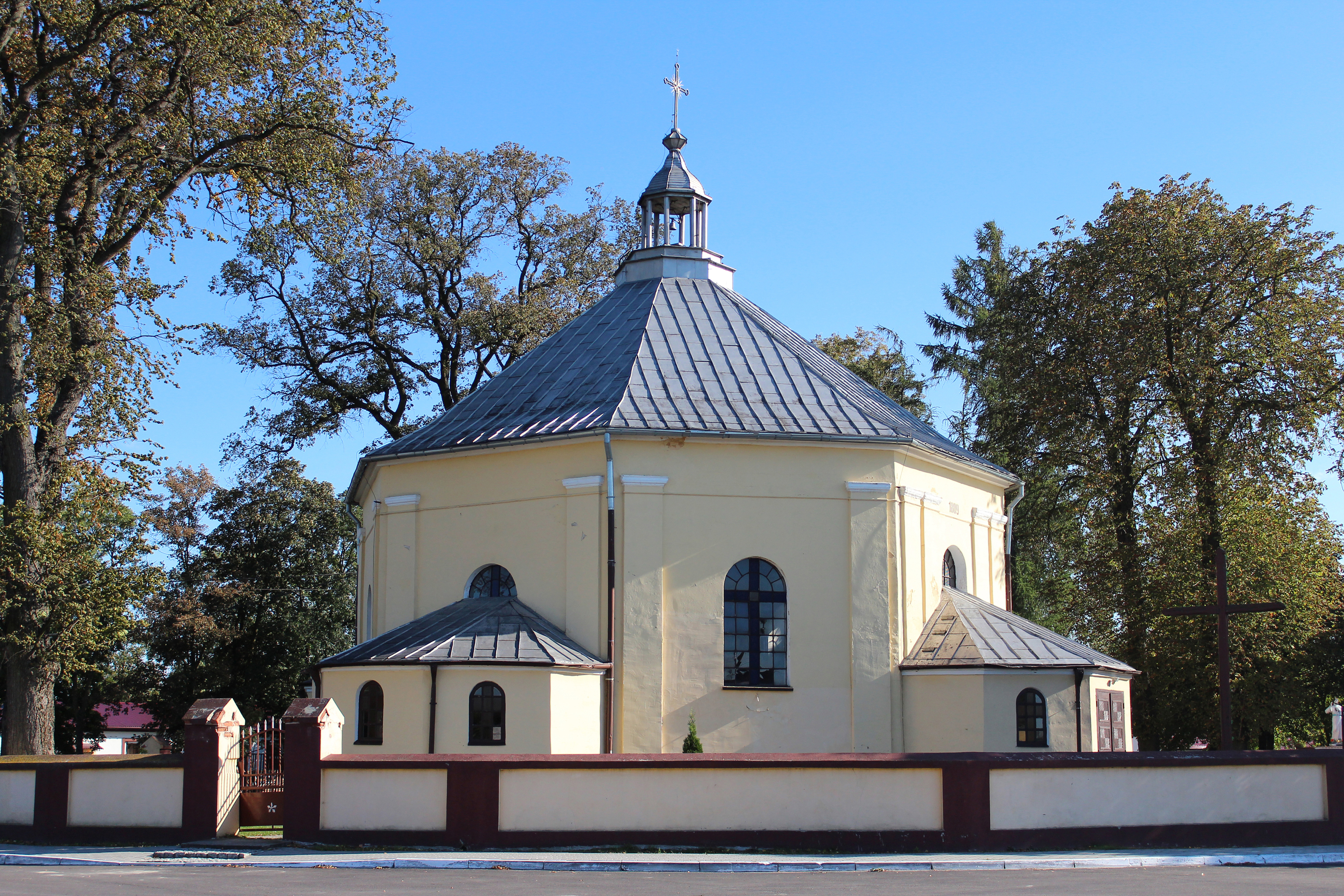 Zygry - kościół pw. Św. Rocha (dawniej św. Wojciecha), 1809